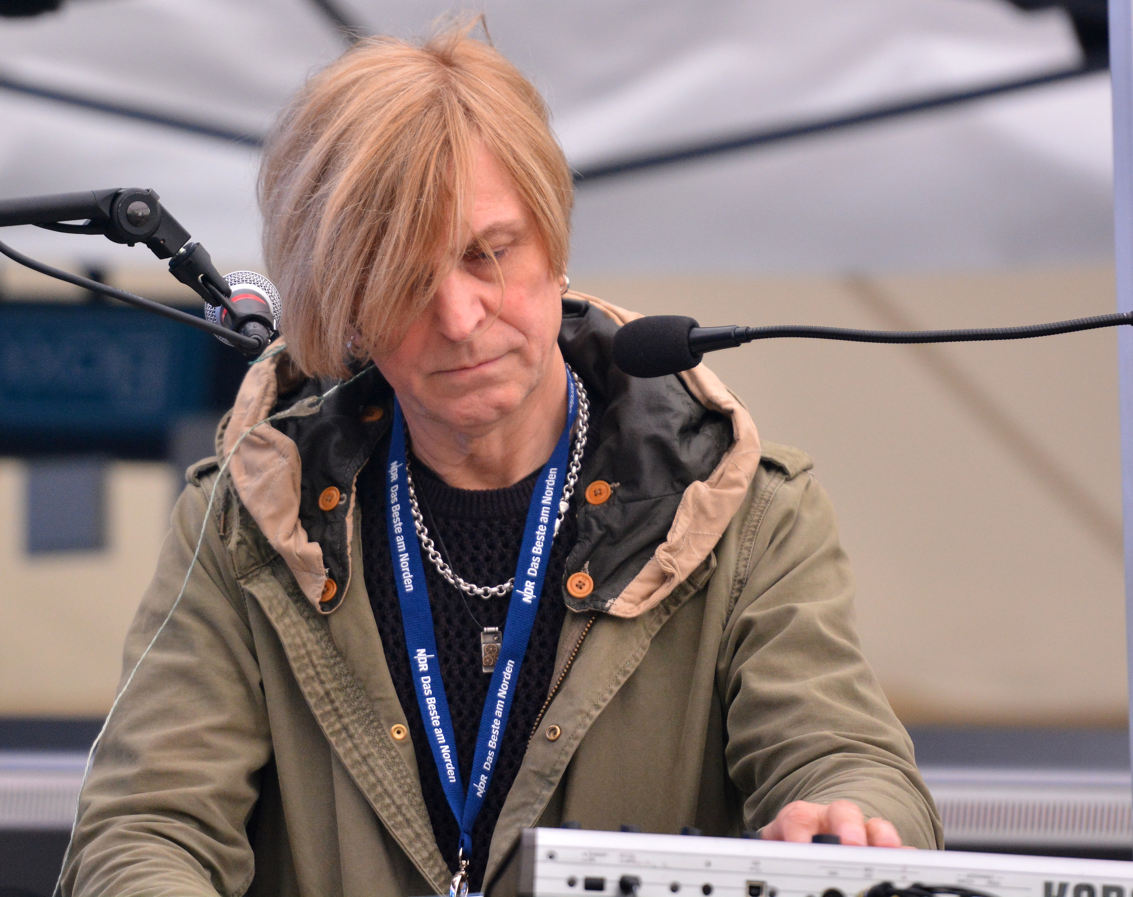 Ritchie Barton von Silly beim Soundcheck auf der NDR-Bühne beim 825. Hamburger Hafengeburtstag 2014